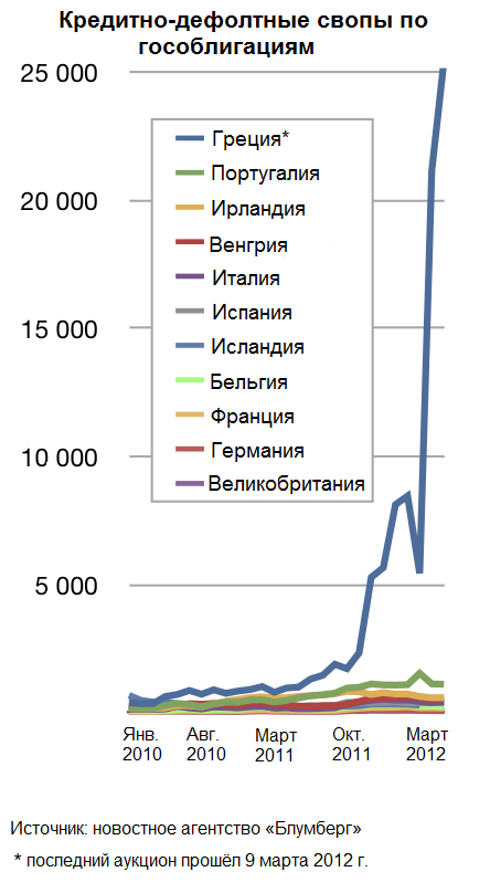 Ежемесячное изменение цен на кредитно-дефолтные свопы (сроком на 5 лет) ряда европейских стран начиная с января 2010 г. (цены приводятся на конец месяца). Значения на оси y приводятся в базисных пунктах. Деление со значением 1000 соответствует стоимости в 1 млн долларов страхования облигаций на 10 млн долларов США на 5 лет. Использованы данные агентства "Блумберг" по Греции ( Португалии ( Ирландии ( Венгрии ( Италии ( Испании ( Бельгии ( Франции ( Германии ( и Великобритании ( В одном проценте 100 базисных пунктов. Стоимость одного базисного пункта по кредитно-дефолтному свопу, страхущему от дефолта по обигациям на 10 млн долларов США на 5 лет, составляет тысячу долларов США в год. Таким образом, стоимость страховки от дефолта по гособлигациям Греции на 10 млн долларов США при курсе 2 тыс. базисных пунктов составит 2 000 x $1 000 = $2 000 000. Кроме того, возможно существование первоначальных взносов, составляющих определённую долю от общей стоимости страхуемых облигаций (статья "Блумберг", опубликованная в ноябре 2008 г.: "Данные по кредитно-дефолтным совпам скрывают действитвельную степень риска"